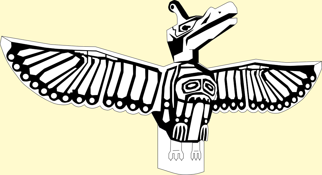 Sujet : Dessin librement inspiré d'un totem amérindien de Colombie-Britannique (Canada). Format : PNG. Logiciel de dessin utilisé : Inkscape